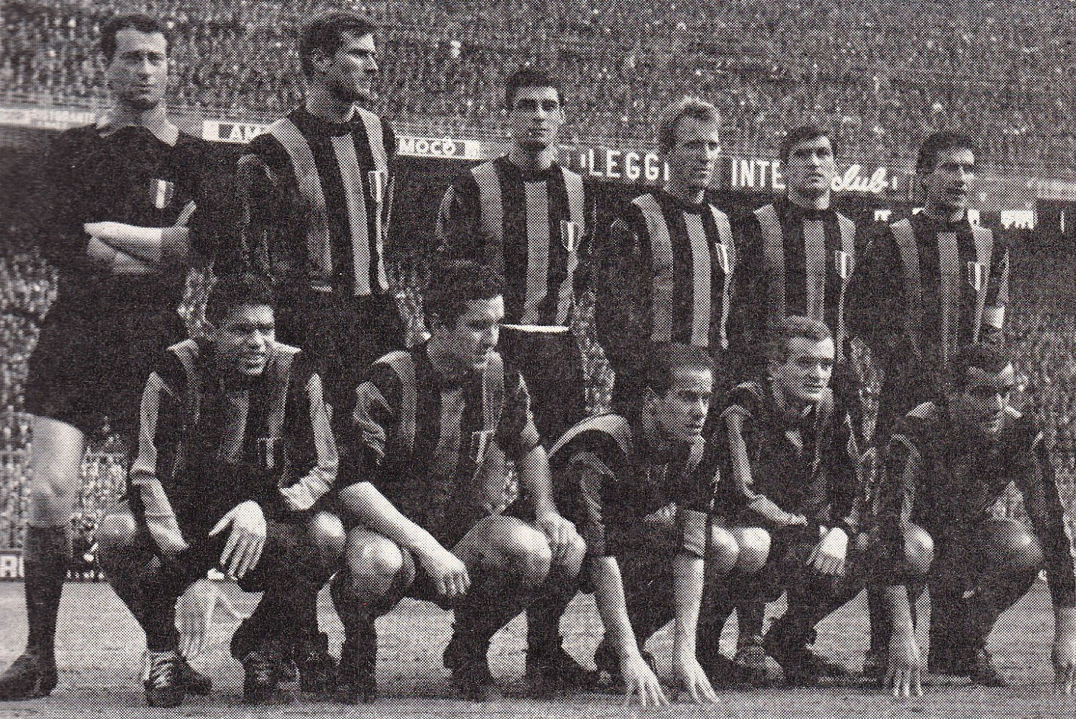 Una formazione dell'Inter nella stagione 1963-64, in posa all'interno dello stadio San Siro di Milano. Da sinistra, in piedi: G. Sarti, G. Facchetti, A. Guarneri, C. Tagnin, T. Burgnich, A. Picchi (capitano); accosciati: Jair da Costa "Jair", B. Petroni, L. Suárez Miramontes, S. Mazzola, M. Corso.